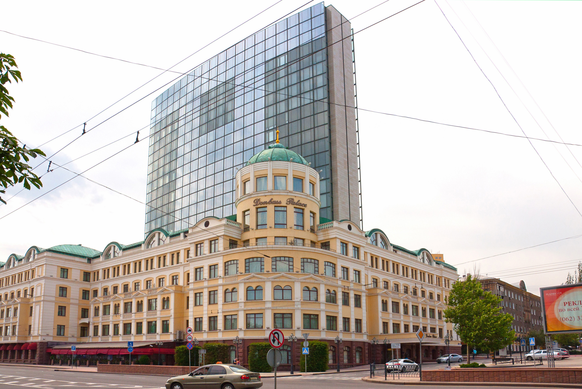 Готель Donbass Palace, Донецьк, вул.Артема,80